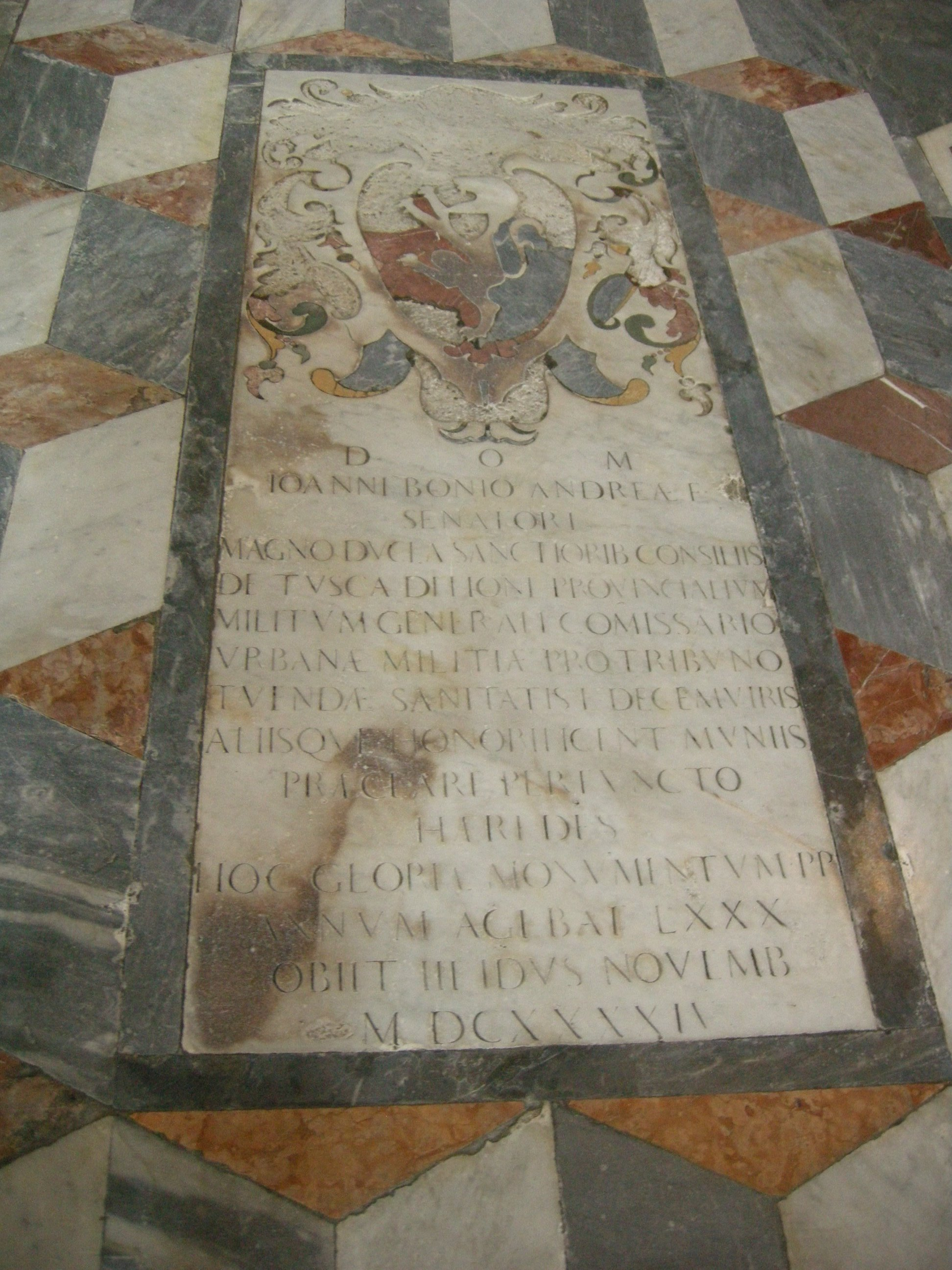 San gaetano, pavimento, lapide 04 boni